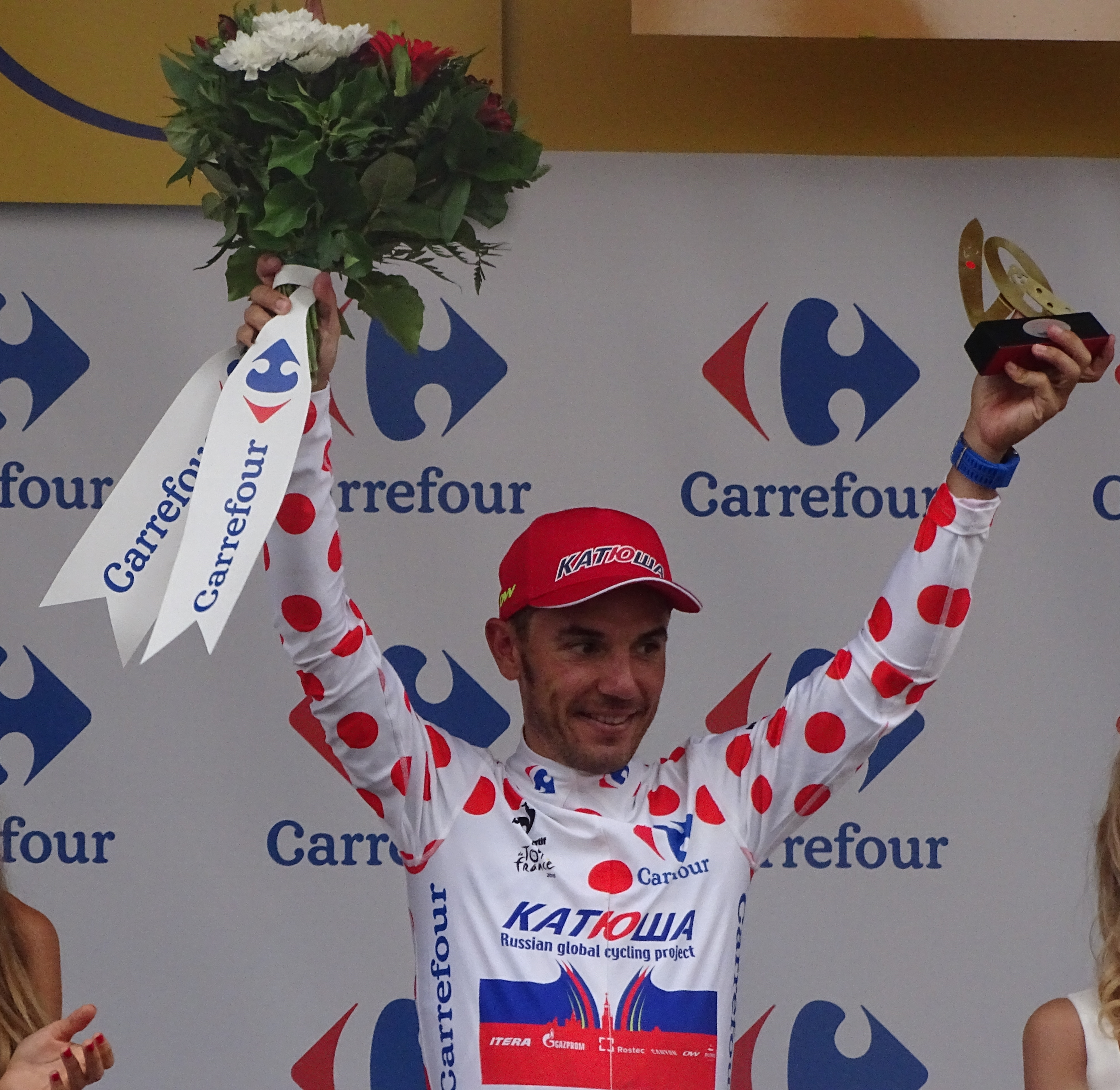 Reportage réalisé le mardi 7 juillet à l'occasion de l'arrivée de la quatrième étape du Tour de France 2015 à Cambrai, Nord-Pas-de-Calais, France.